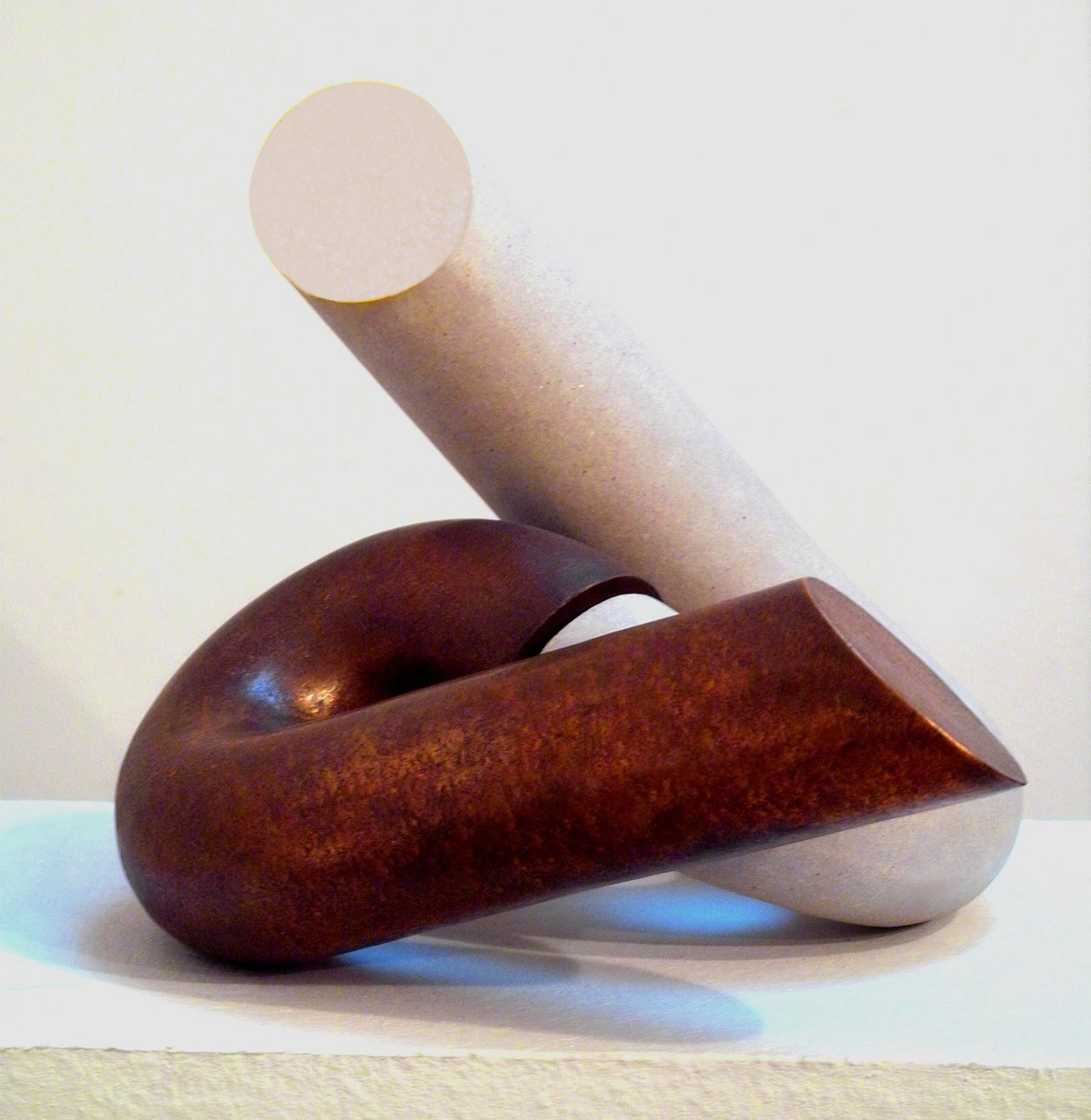 Fotografie einer Arbeit von Marlies Seeliger-Crumbiegel